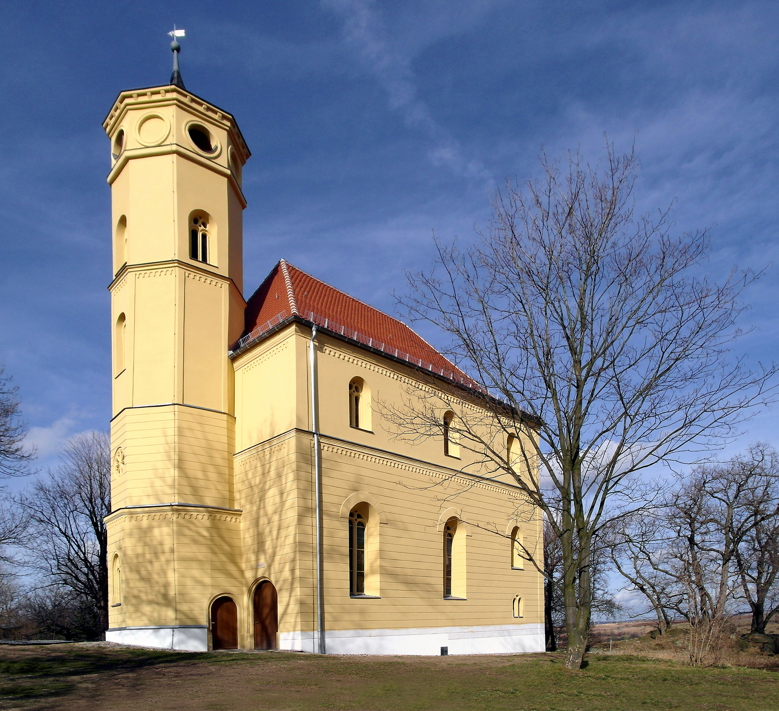 17.02.2014 01809 Gamig (Dohna): Schloßkapelle (GMP: 50.962353,13.840643), Spätgotik/Renaissance, 1. Hälfte 16. Jahrhundert. Zweigeschossig, spätgotisches Sterngewölbe. Im Obergeschoß Saal, vermutlich von 1656. Sicht von Südosten. [SAM1808.JPG]20140217050DR.JPG(c)Blobelt